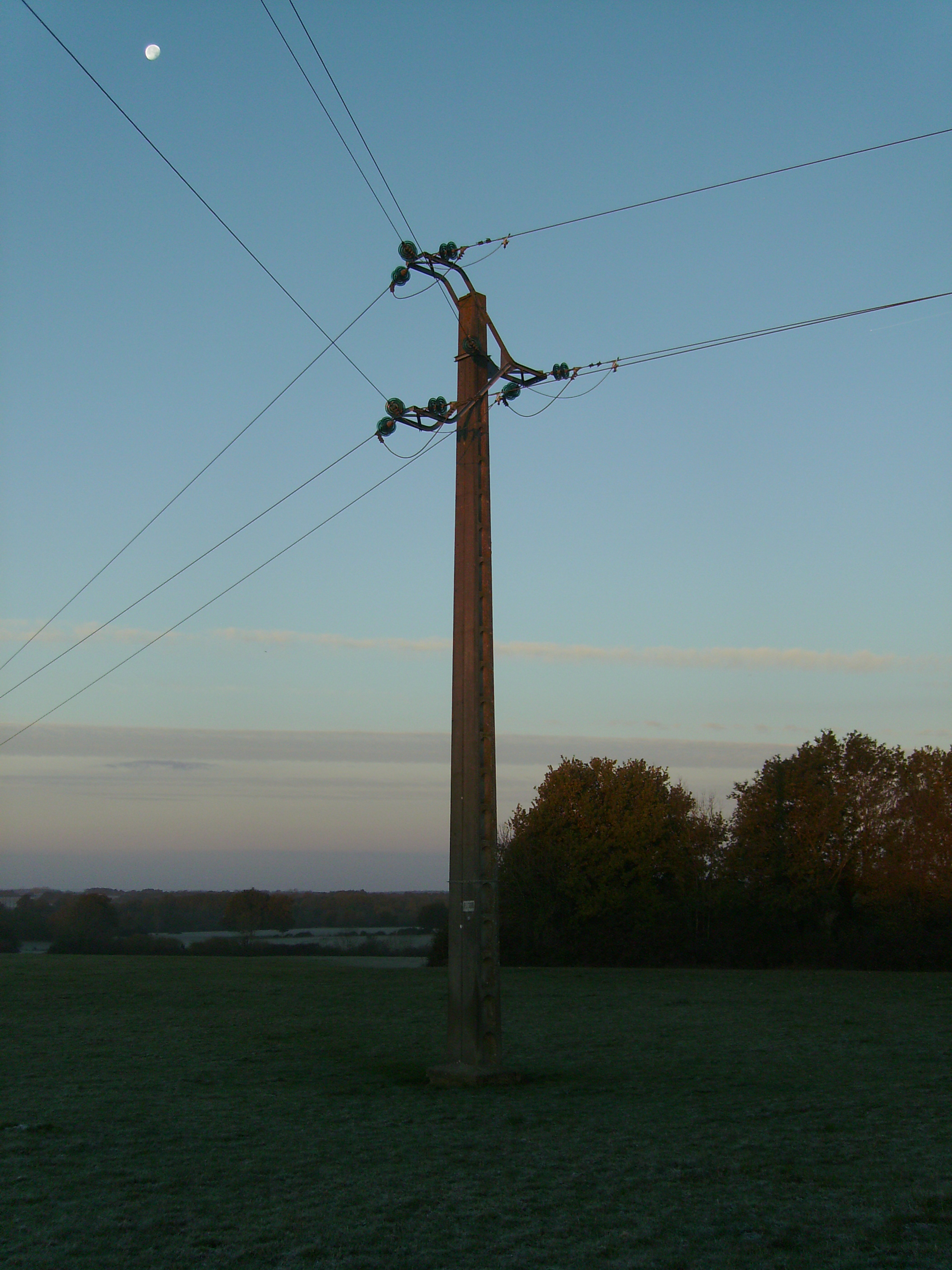 Photographie prise à la Meilleraie-Tillay, près des carrières, et présentant un exemple de poteau béton armé de fabrication Garczynski Traploir, soutenant des lignes 20kV.